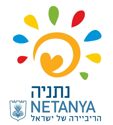 סמל העיר נתניה שבוטל לאחר מכן